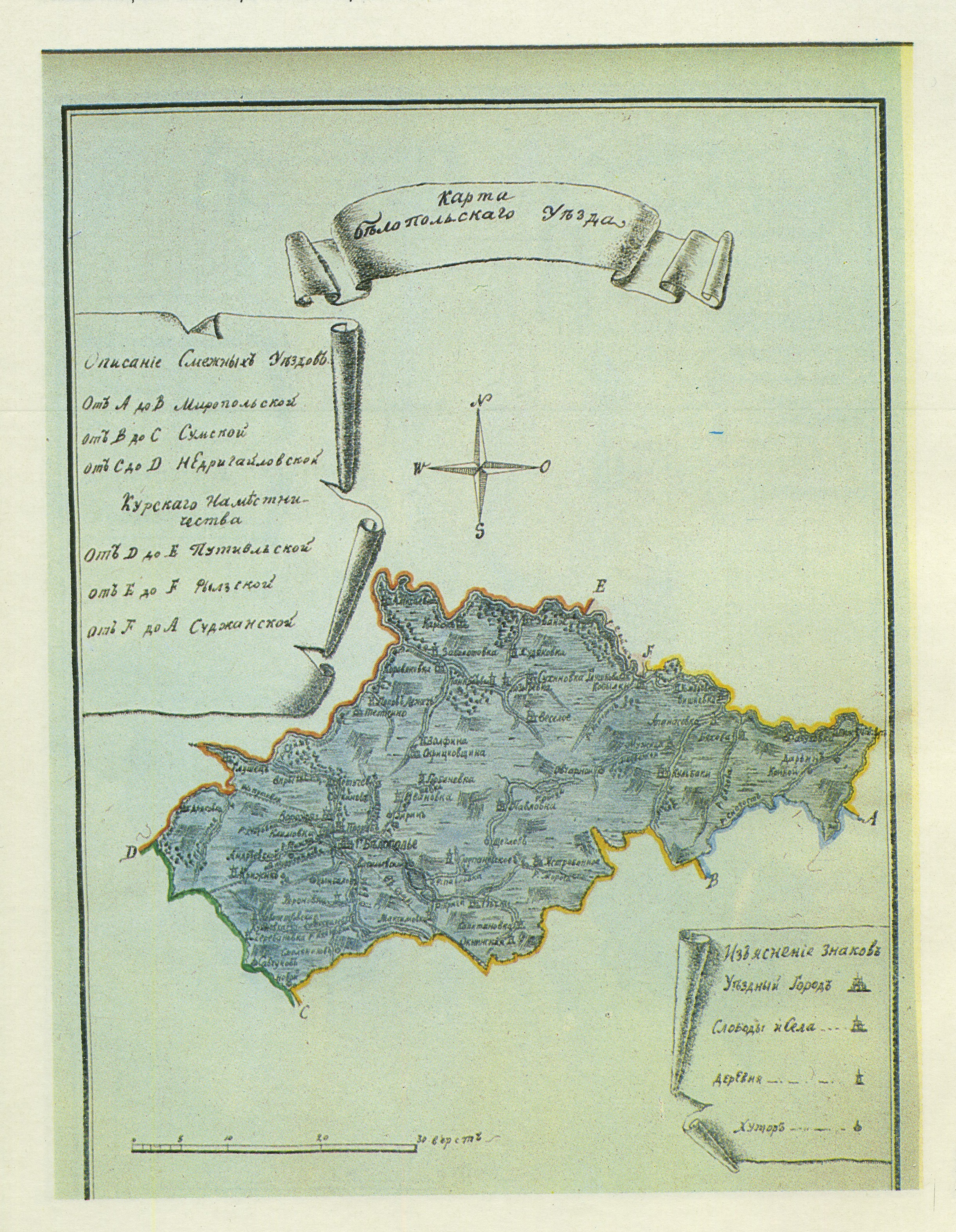 Карта Белопольского уезда в "Топографическом описании Харьковского наместничества". Оригинал. Конец XVII века.